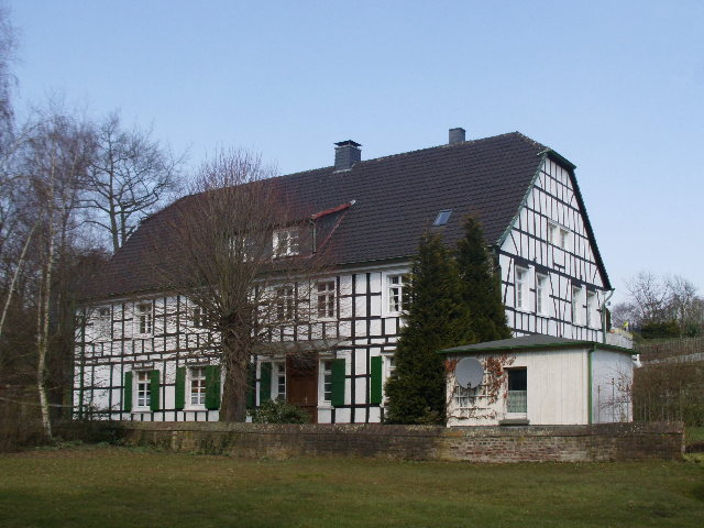 Fachwerkhaus „Haus Lind“ bzw. „Haus Dönhoff“ (manchmal auch Dönhof, Dönnhof oder Dönnhoff geschrieben), Amselweg 6, Wetter-Wengern; Ansicht vom Ruhrtalradweg aus This is the photograph of an architectural monument. It is part of the list of cultural monuments of Wetter (Ruhr), no. 75